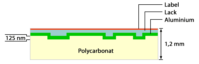 Querschnitt durch eine CD